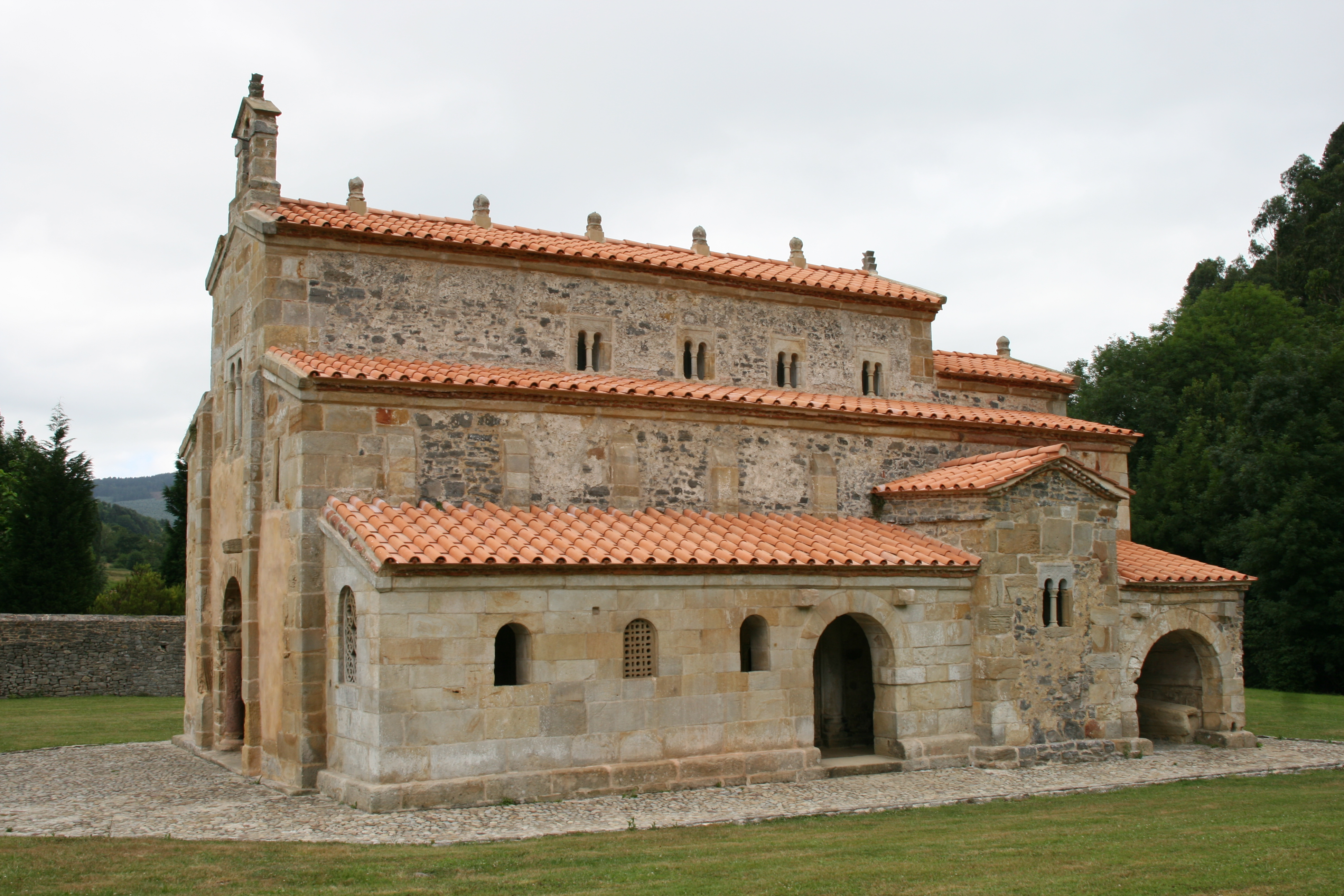 Iglesia prerrománica de San Salvador de Valdediós en Asturias (España)